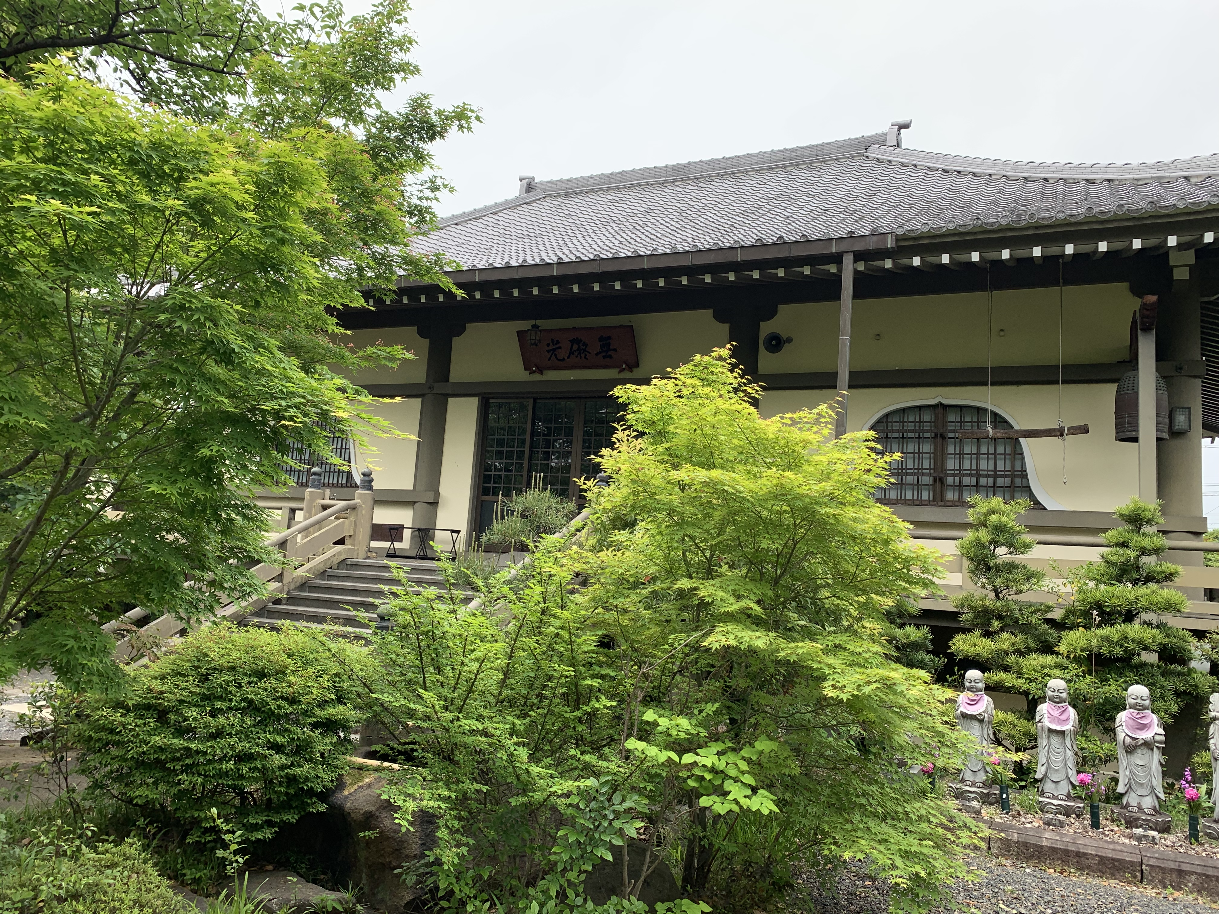 太清寺の十王堂